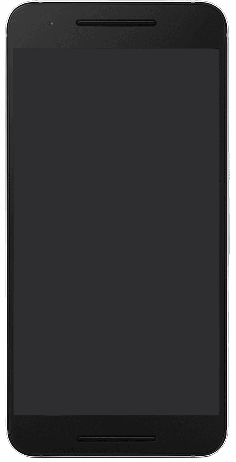 中文（中国大陆）: HuaWei Nexus 6P 模型